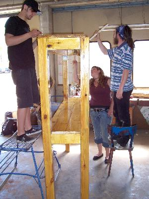 Fertiggestelltes Insektenhotel